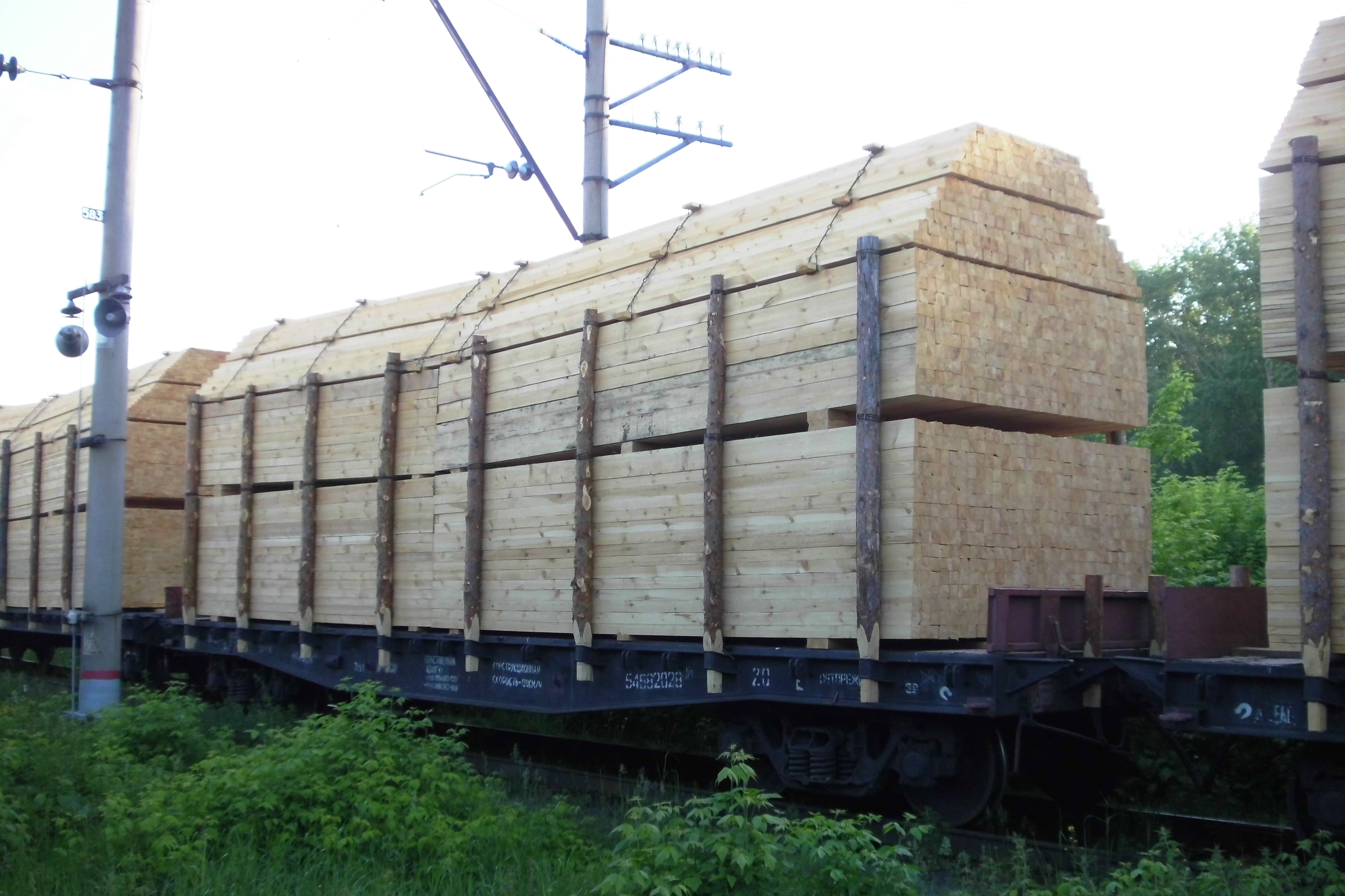 Универсальные железнодорожные платформы загруженные пиломатериалами (доска, брус).